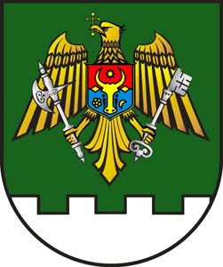 emblema Serviciului Grăniceri al Republicii Moldova